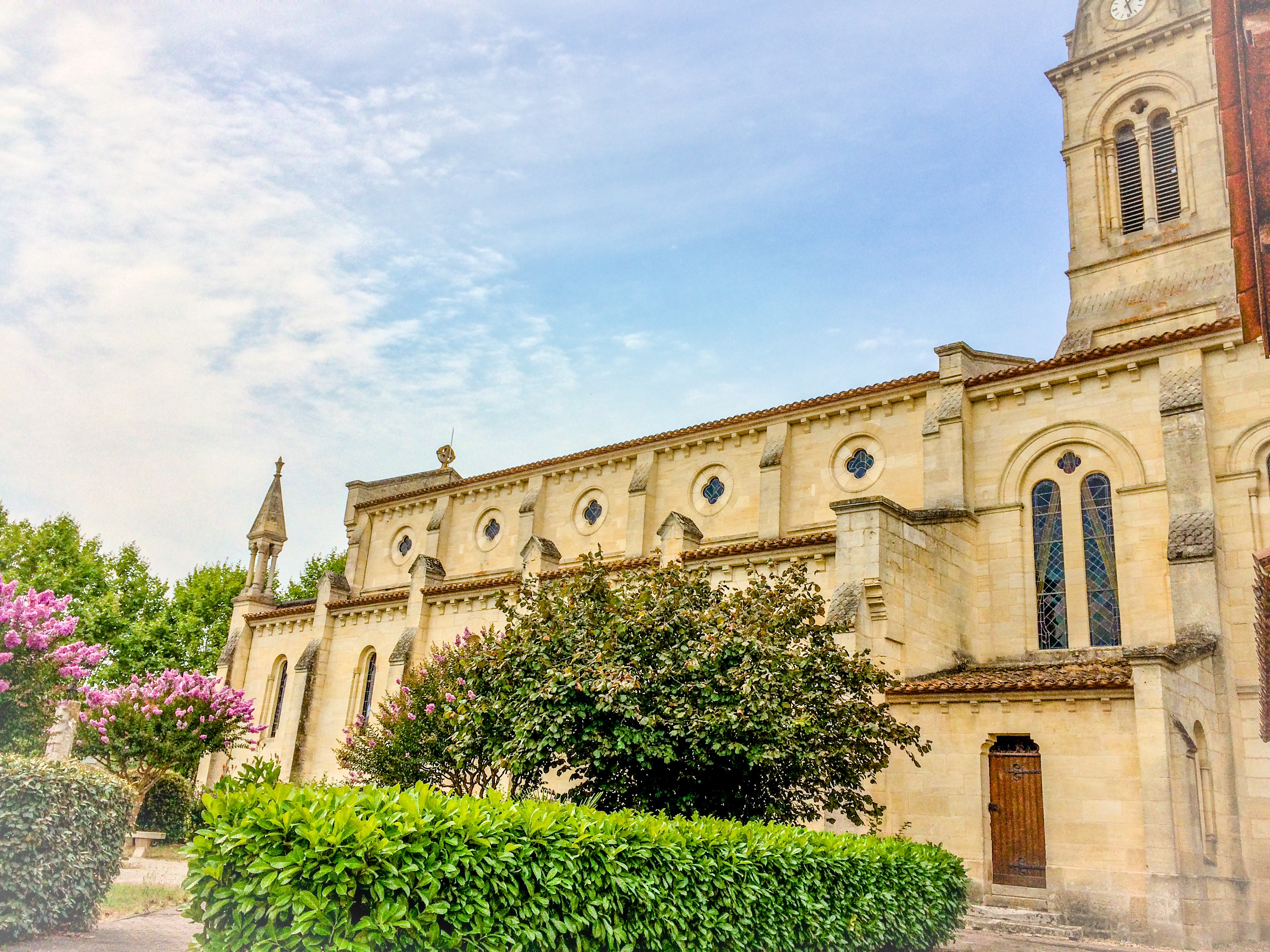 Église Saint-Saturnin (XIXe siècle) de Braud-et-Saint-Louis (Gironde, France)